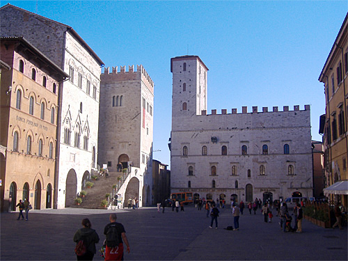 Todi (provincia di Perugia), piazza del Popolo